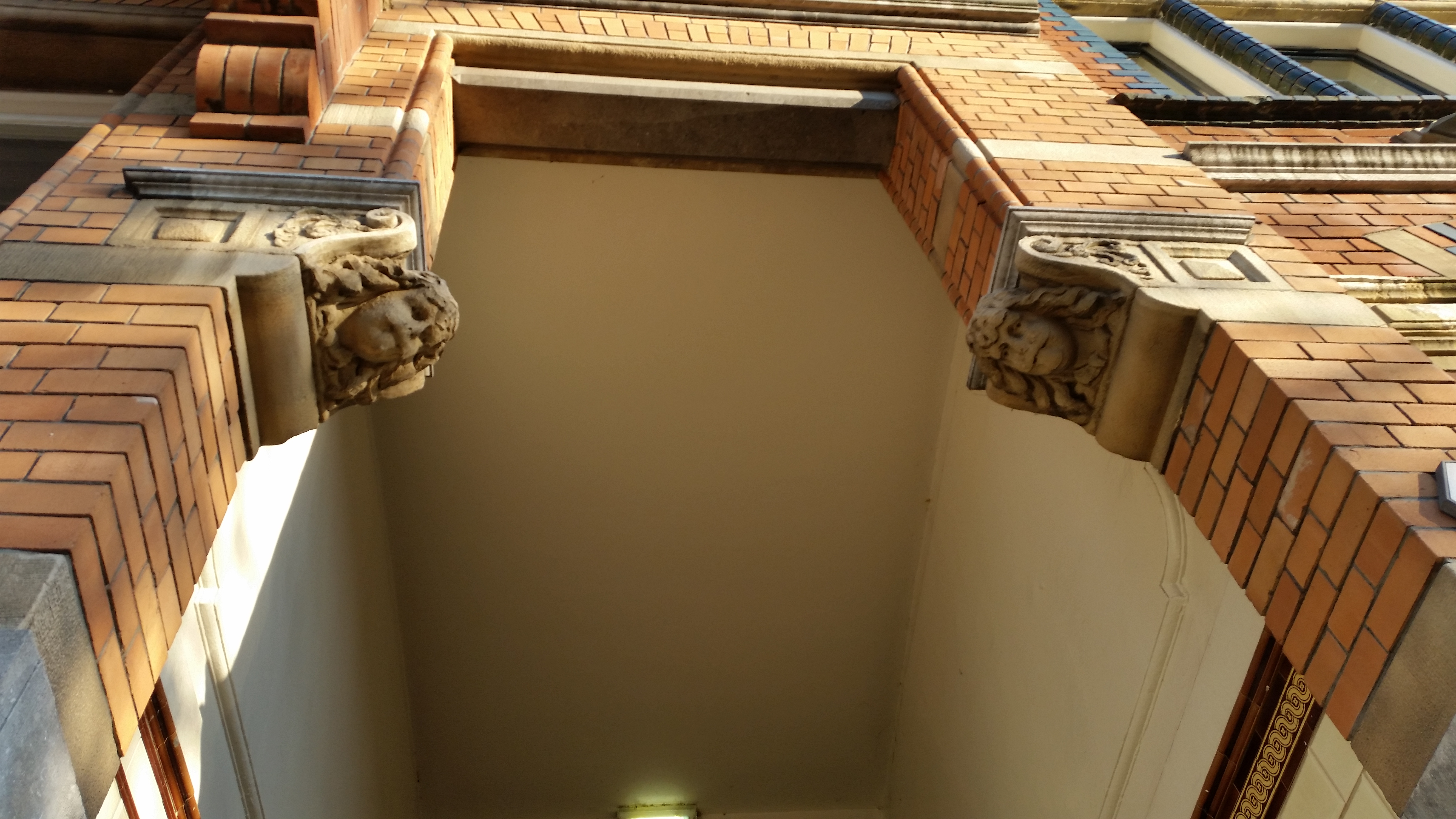 Beeldhouwwerk in Korte Marnixkade 3, Amsterdam